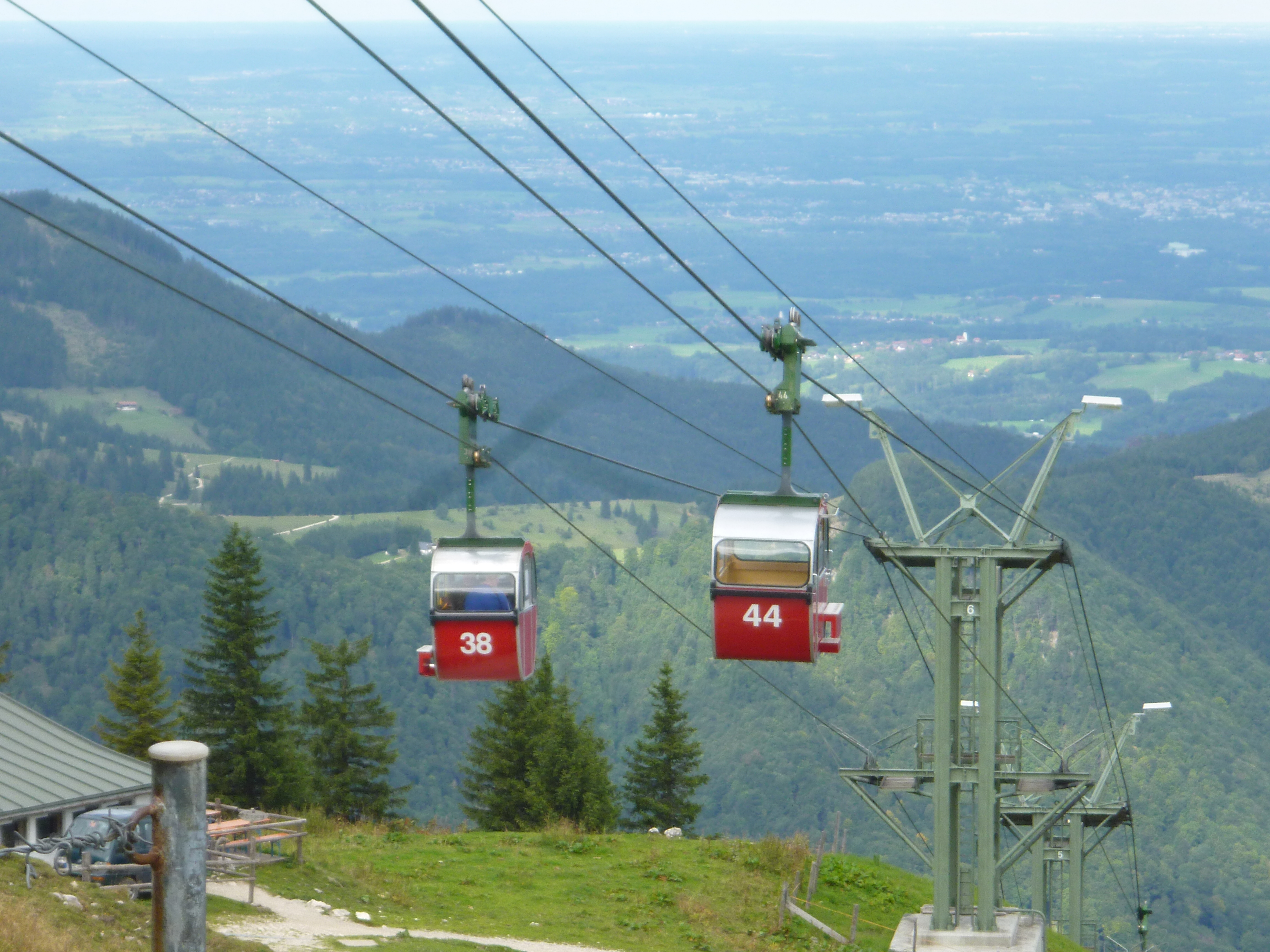 Bergstation, Blick in Richtung Tal